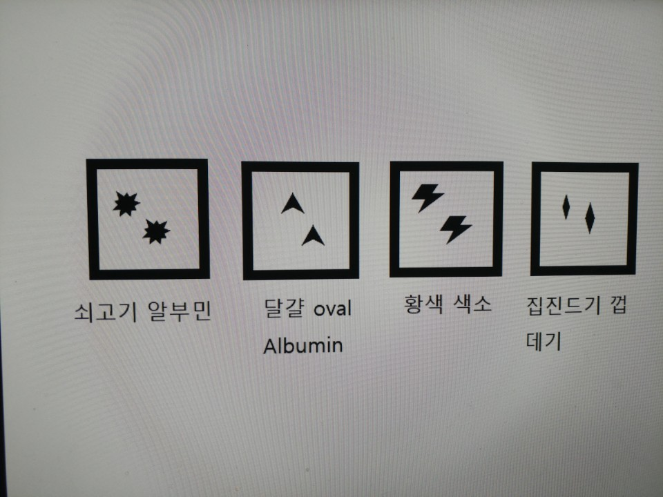 I use 3d painter and take a picture